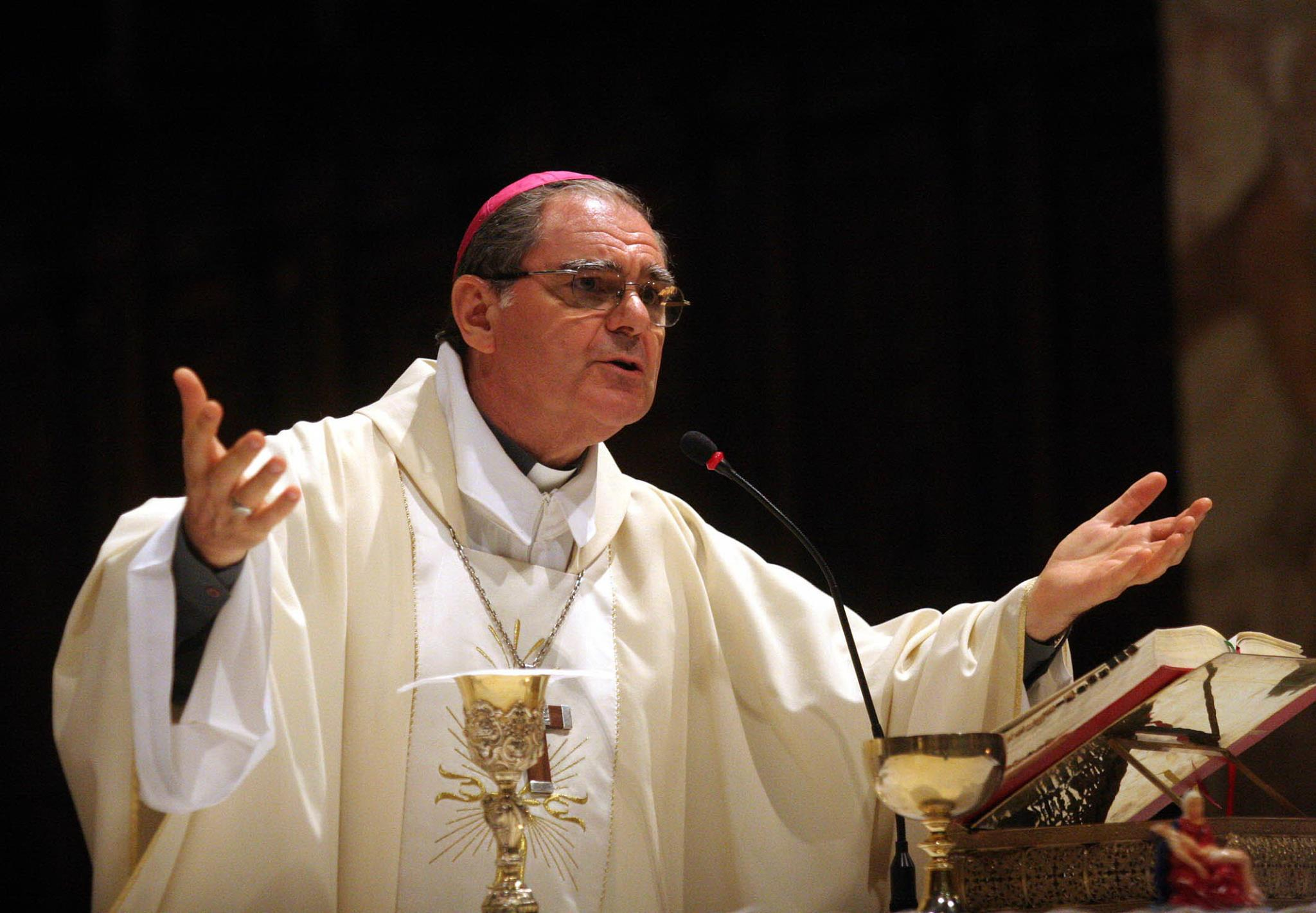 Obispo de la Diócesis de San Isidro